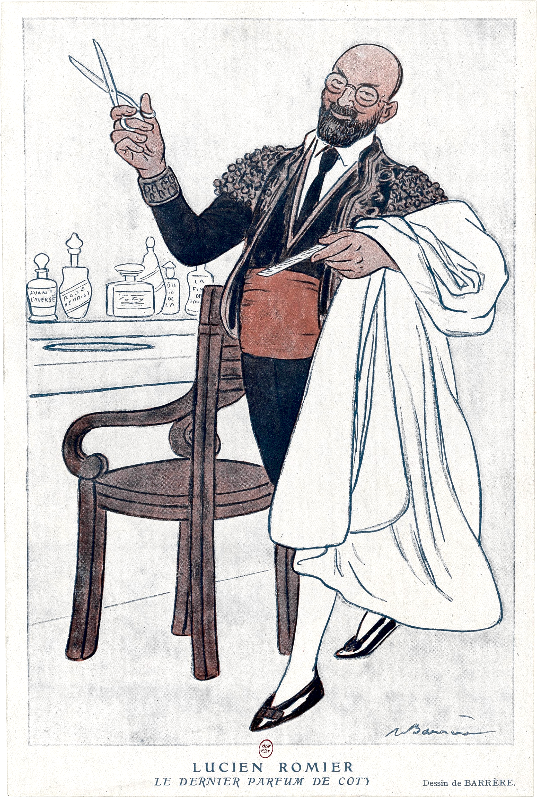 [Collection Jaquet]. Dessinateurs et humoristes. Adrien Barrère. Louis Malteste. Sem. Tome 21 : [défets d'illustrations de périodiques].